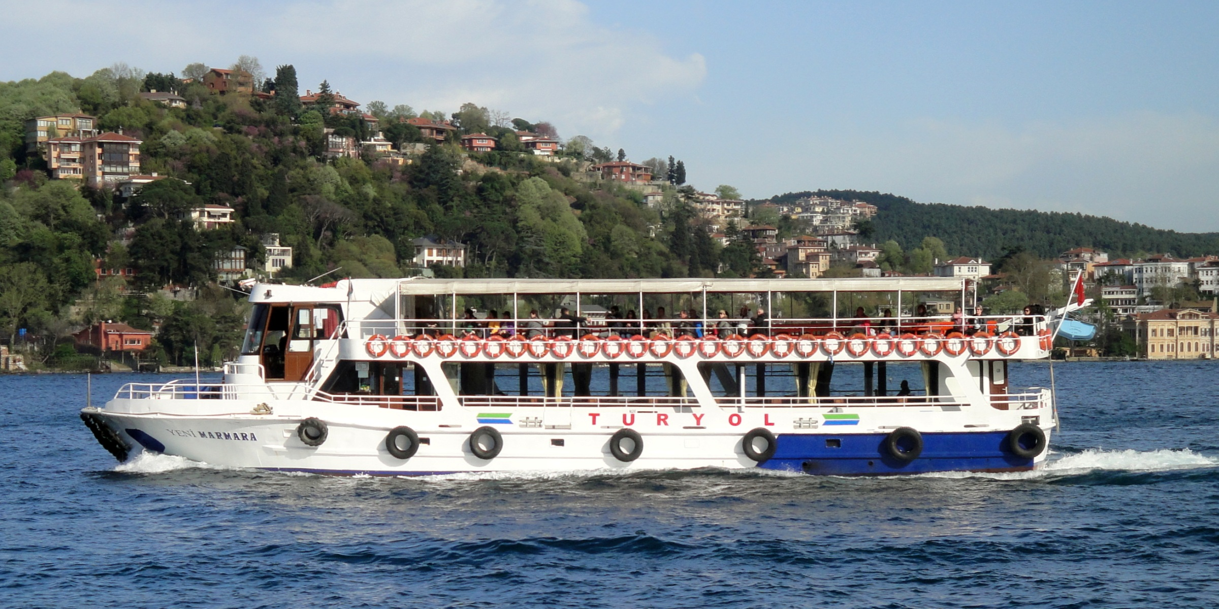 Ausflugsschiff "Yeni Marmara" (Turyol) auf dem Bosporus in Istanbul